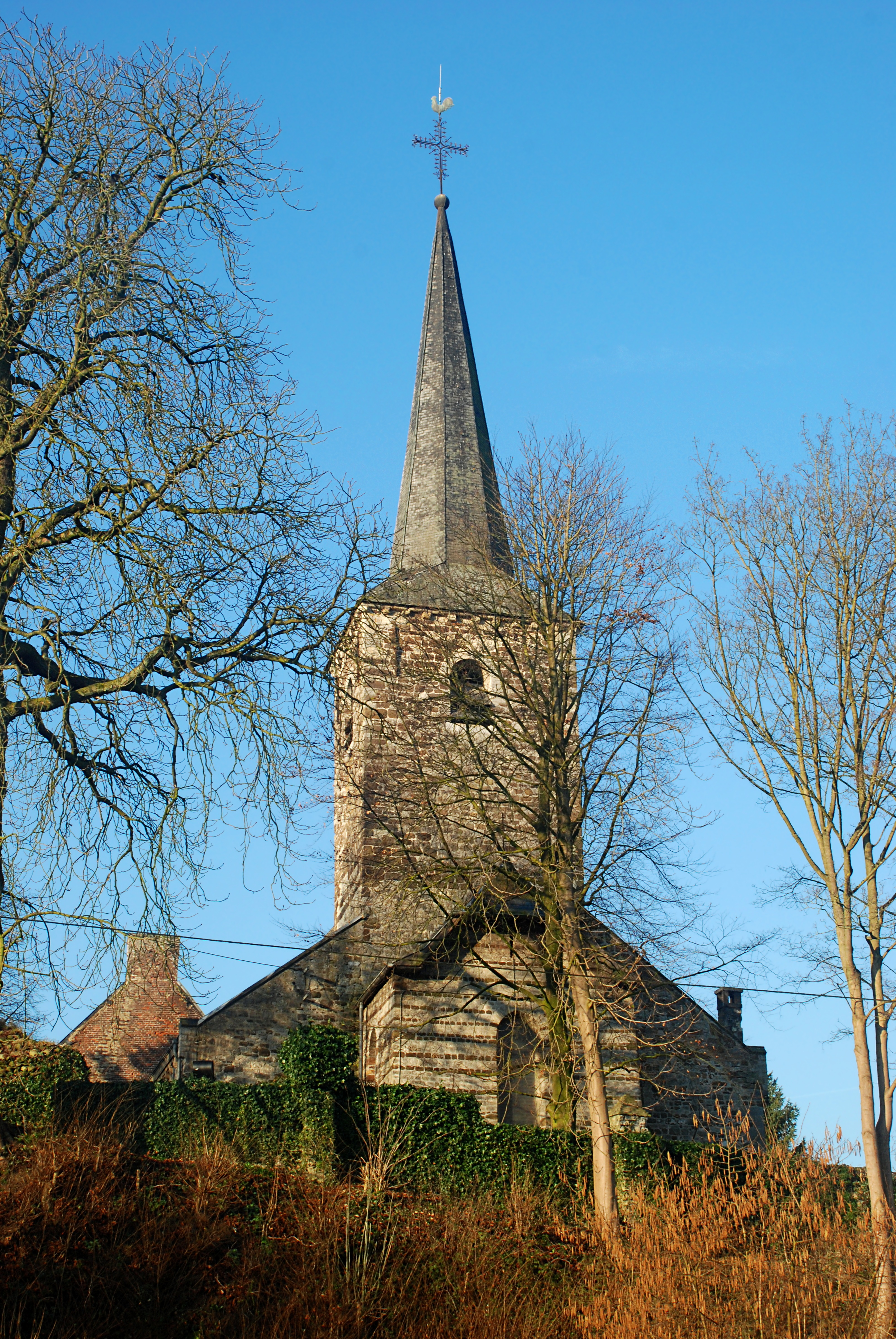 Belgique - Brabant wallon - Chaumont-Gistoux - Église Saint-Bavon de Chaumont